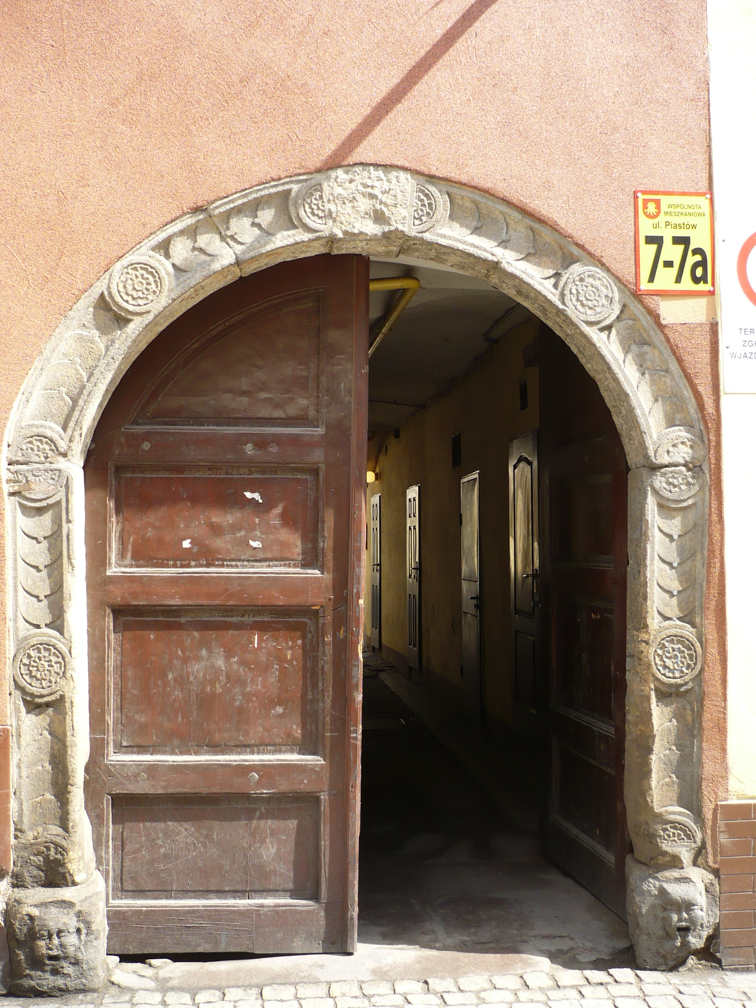 Nowa Ruda, ul. Piastów 7 - brama domu, 1815, przebud. w XX w. (zabytek nr A/945/1454/WŁ z 11.10.1995)